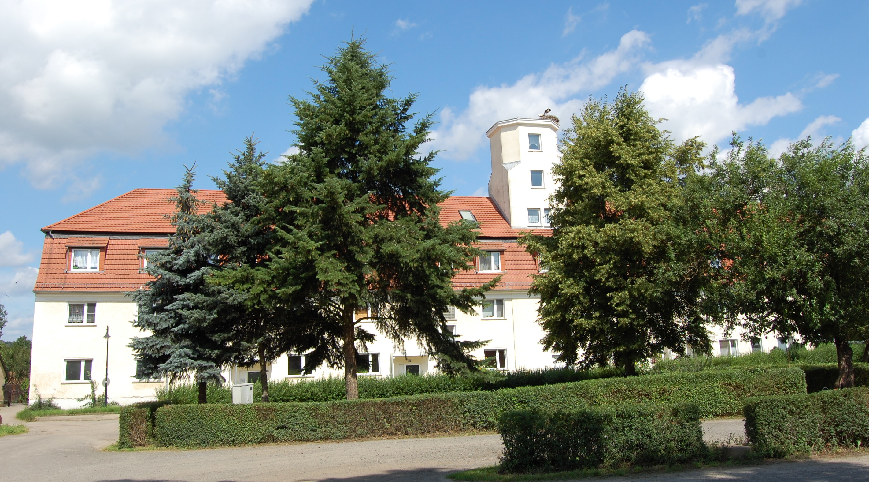 Schloss Straupitz, Turmgebäude mit Storchennest